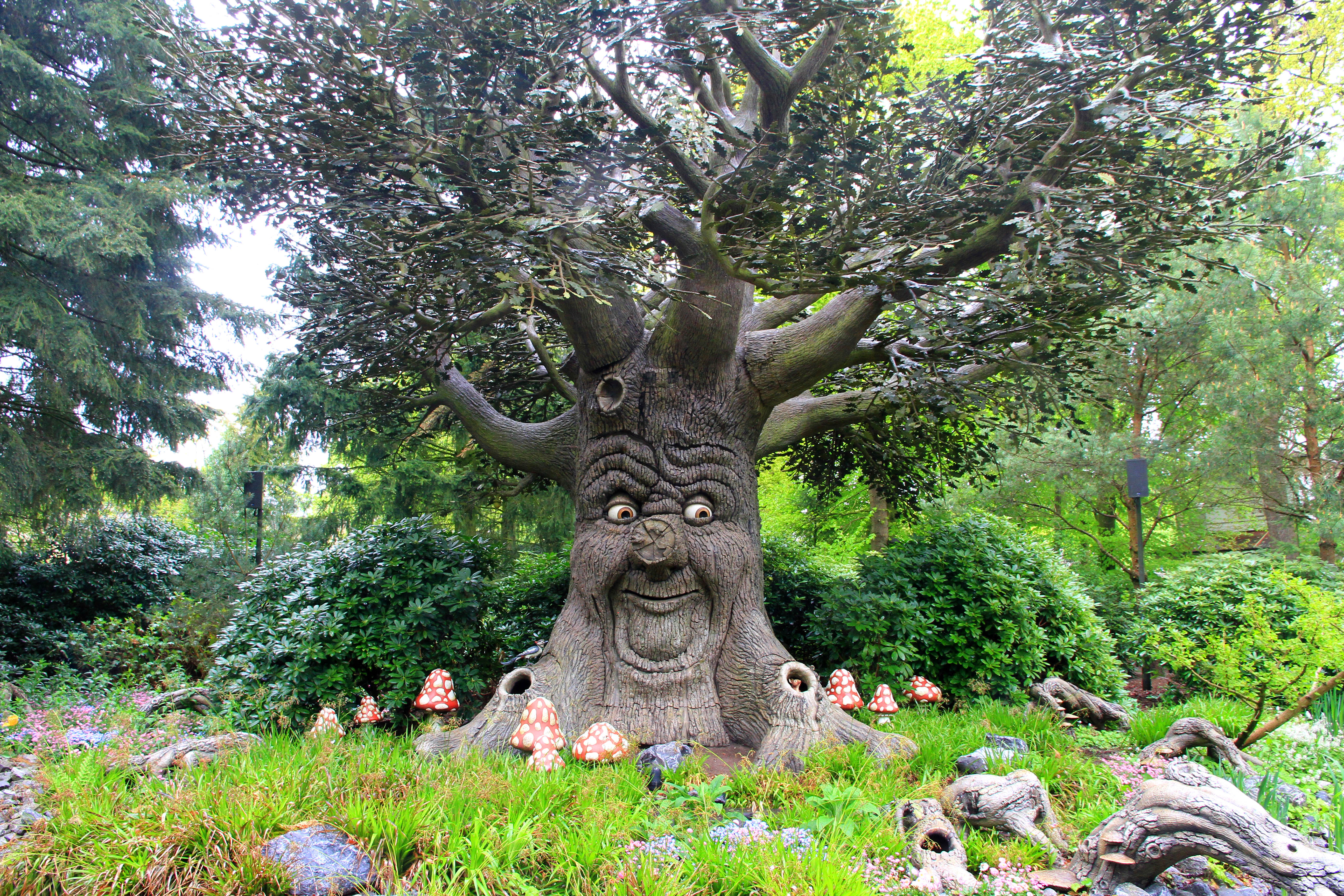 Говорящее дерево в парке Эфтелинг